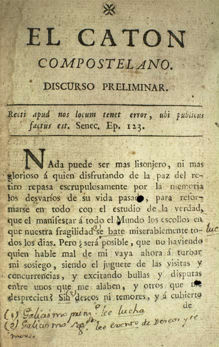 El Catón Compostelano, na exposición Galicia 100.